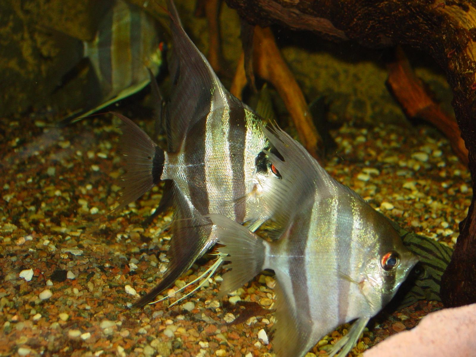 self made.